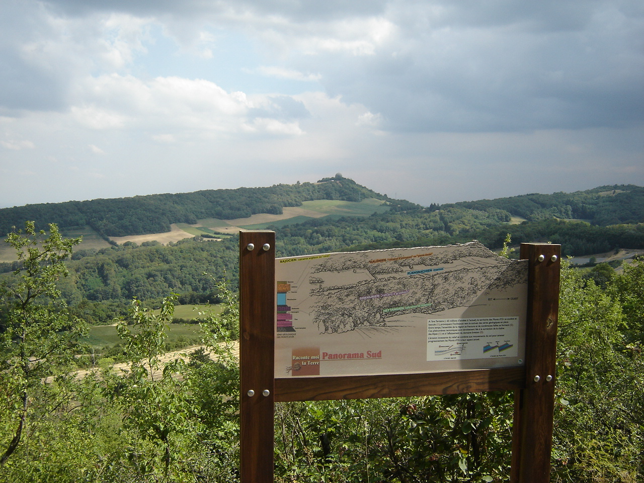 Vue intérieure des Monts d'Or (Rhône, France) depuis les hauteurs de Poleymieux-au-Mont-d'Or - Panneau du sentier géologique des Monts d'Or - à l'arrière-plan, Mont Thou.